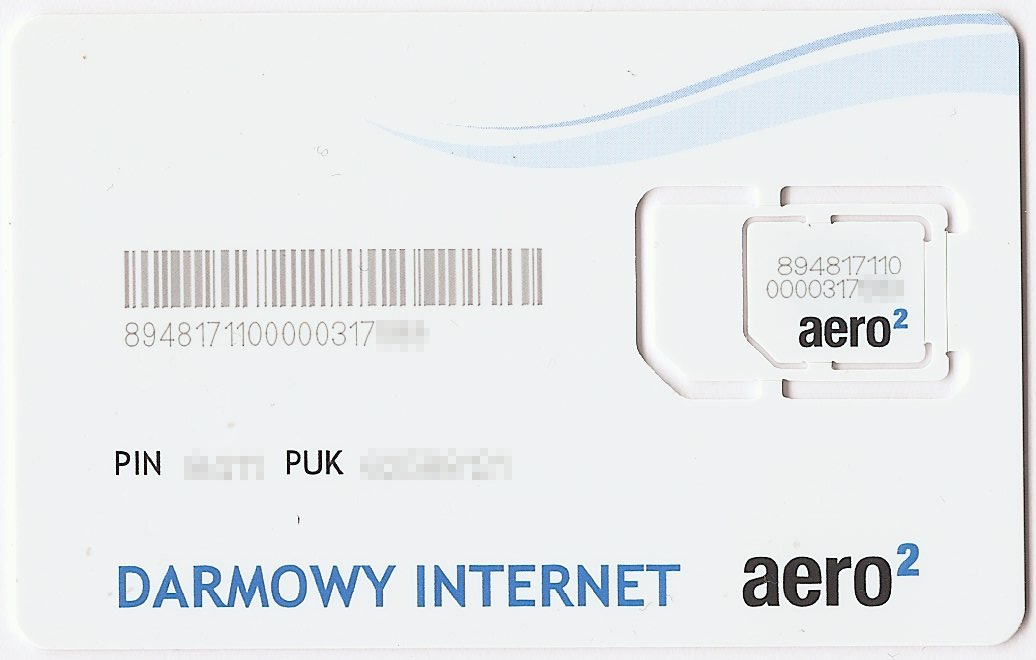 Karta sim bezpłatnego dostępu do internetu aero2 tył